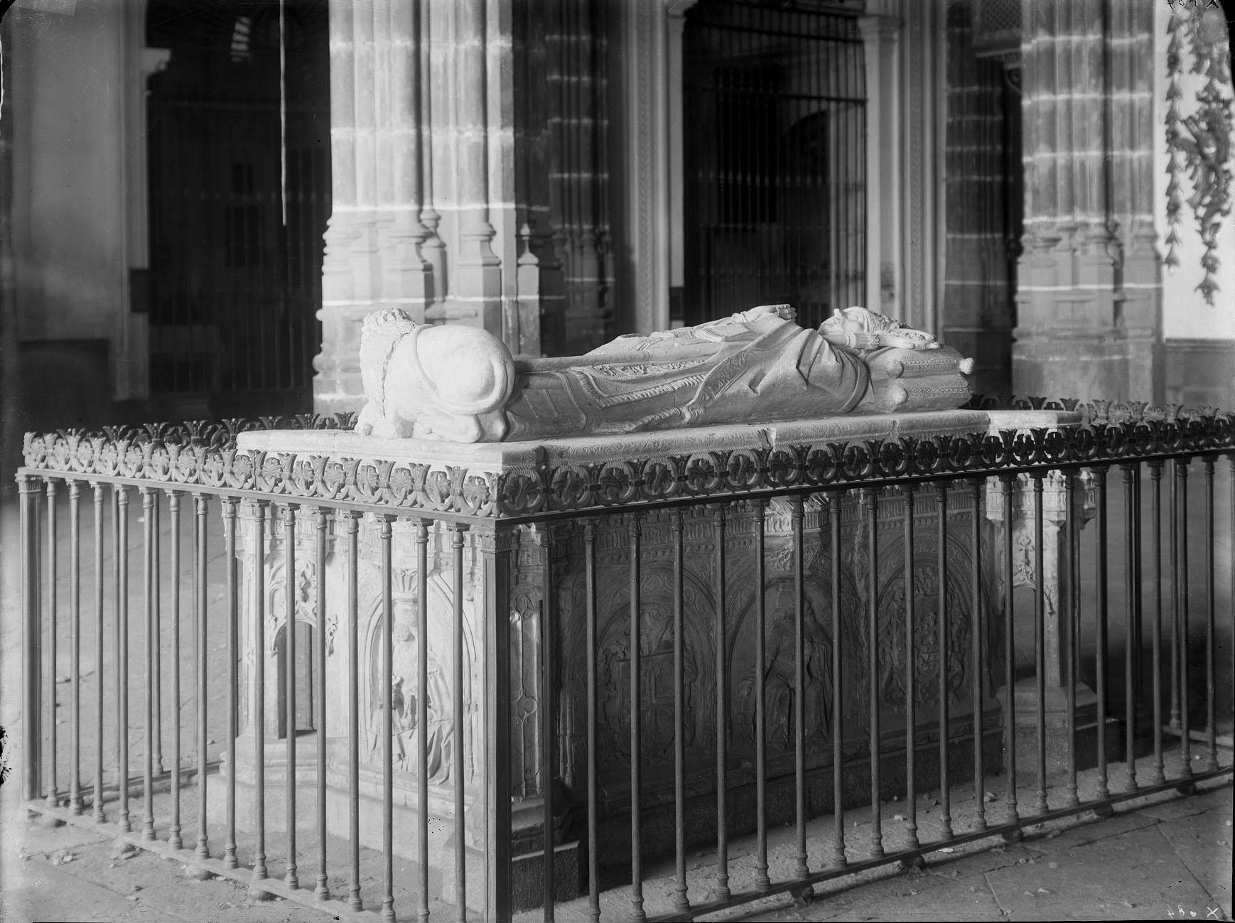 Sepulcro del arzobispo Alonso Carrillo de Acuña en la Catedral de Alcalá de Henares (Comunidad de Madrid - España). Fotografía de Jean Laurent, tomada hacia 1870.